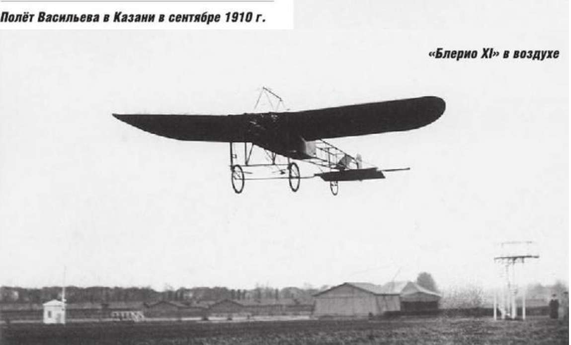 Полёт Александра Васильева на самолёте Блерио XI в Казани в сентябре 1910 года.